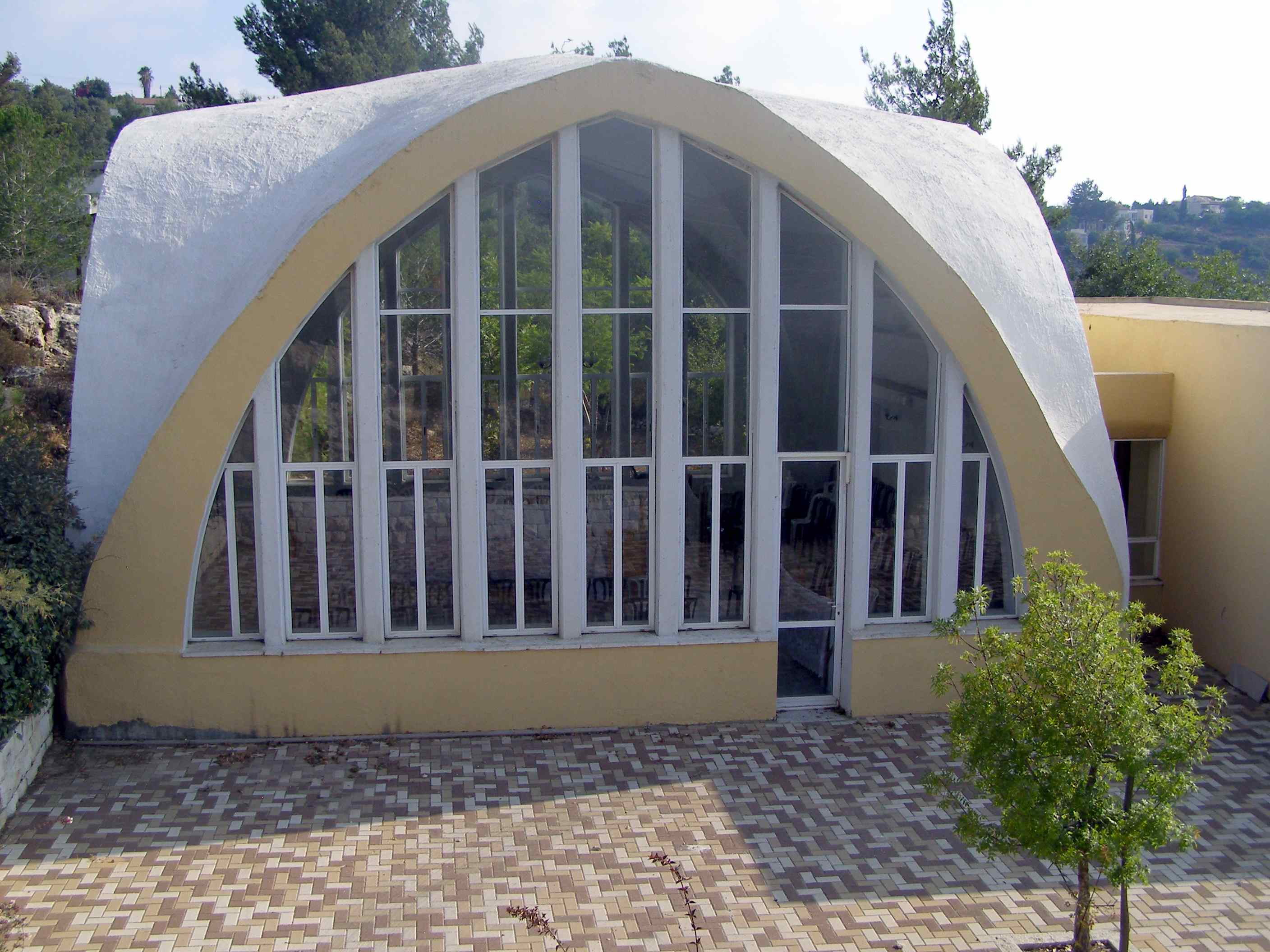 Nataf Synagogue